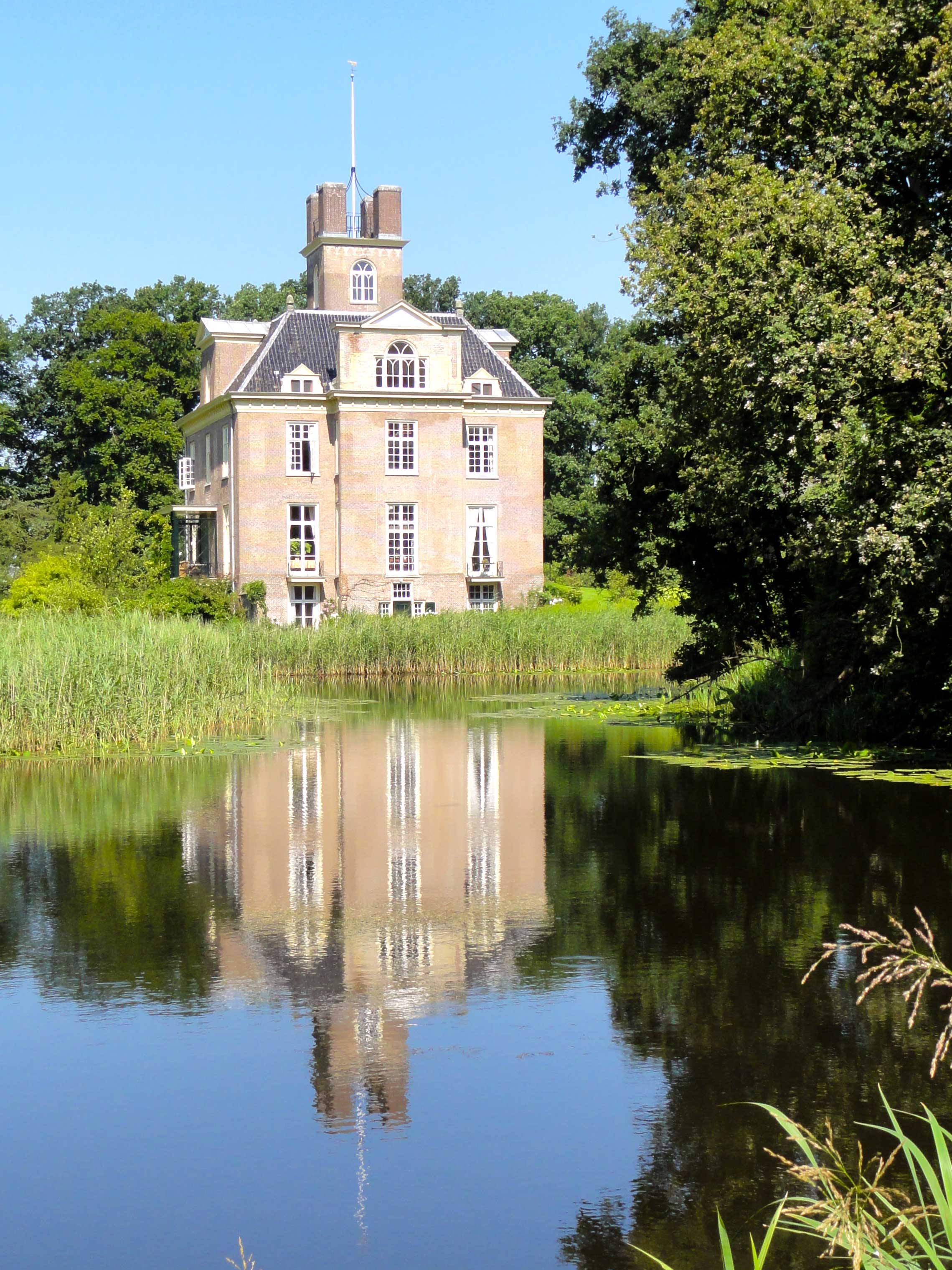 Oldenaller in de gemeente Putten, Gelderland